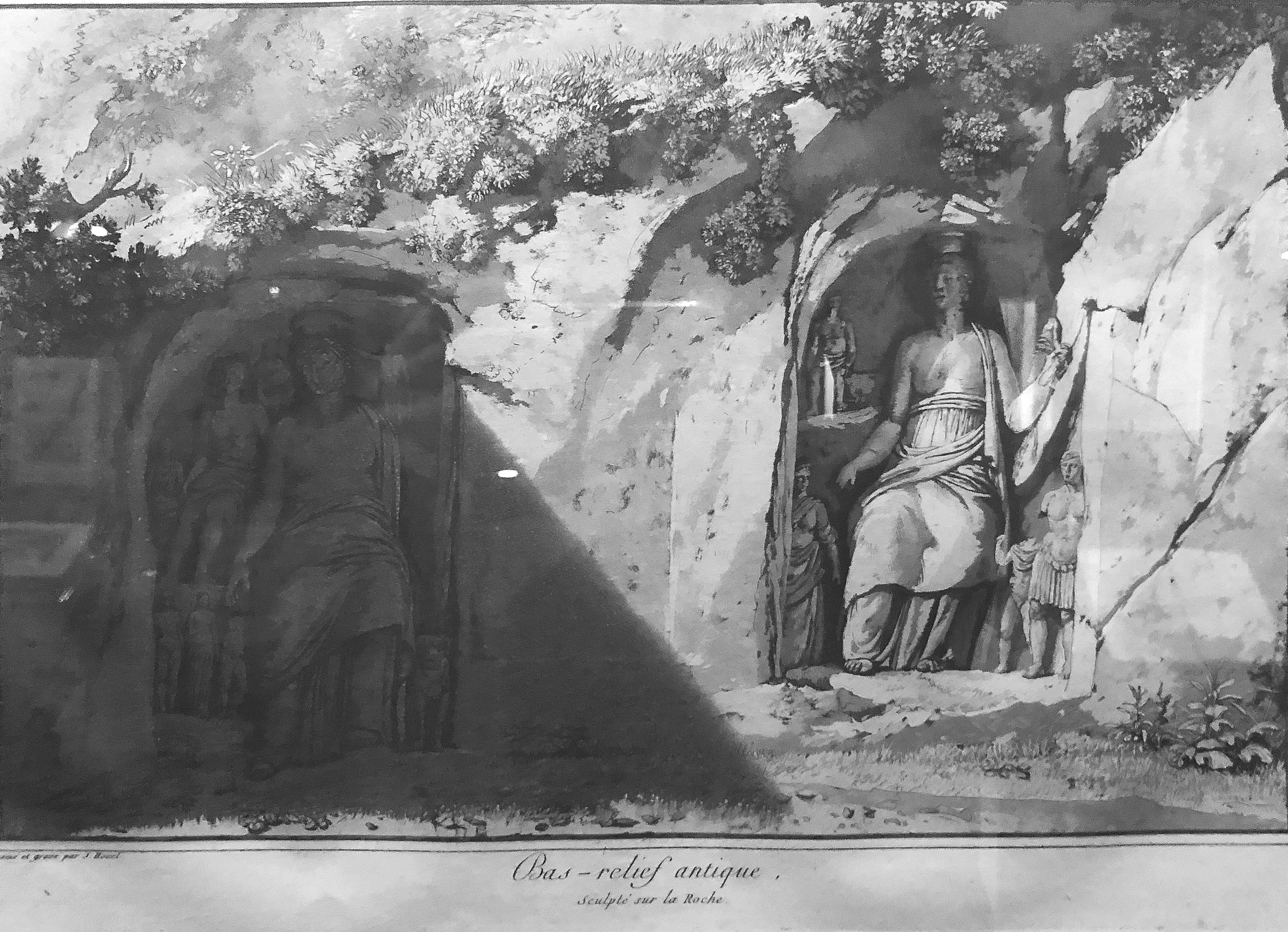 Bassorilievi antichi, Santoni di Palazzolo